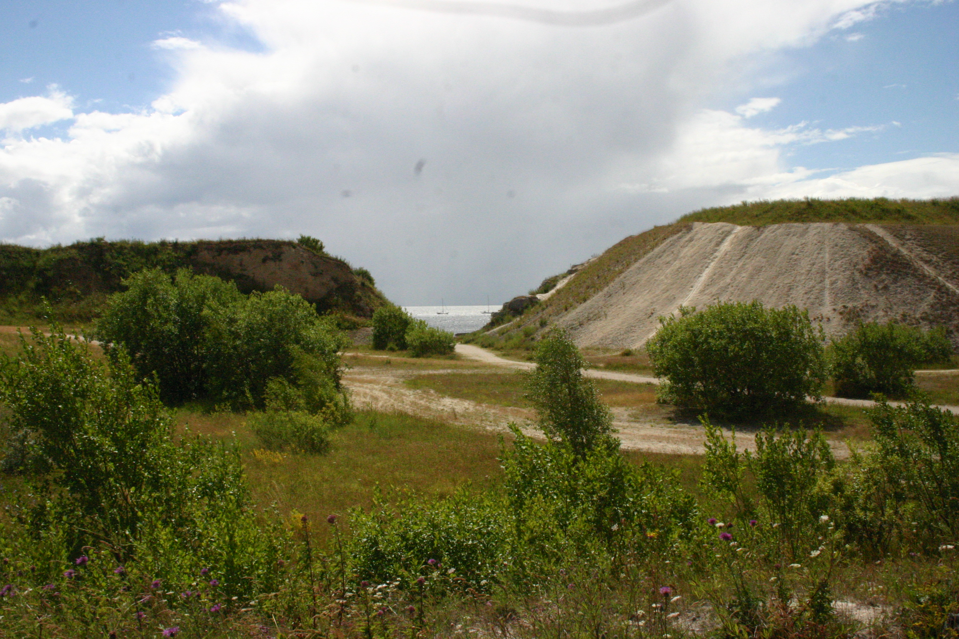 Landskabet i det nu nedlagte Boesdal Kalkbrud